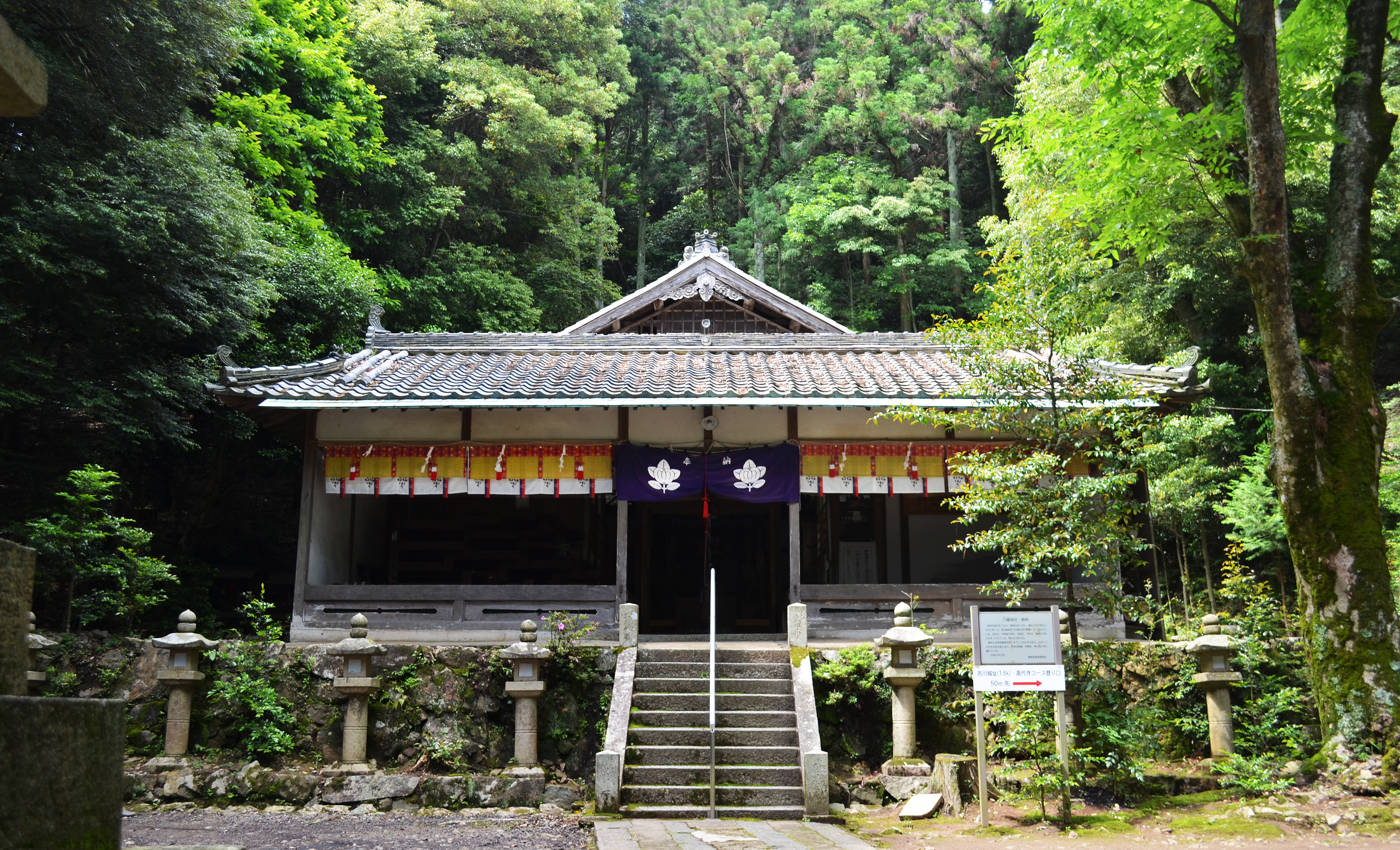 吉川八幡神社社殿